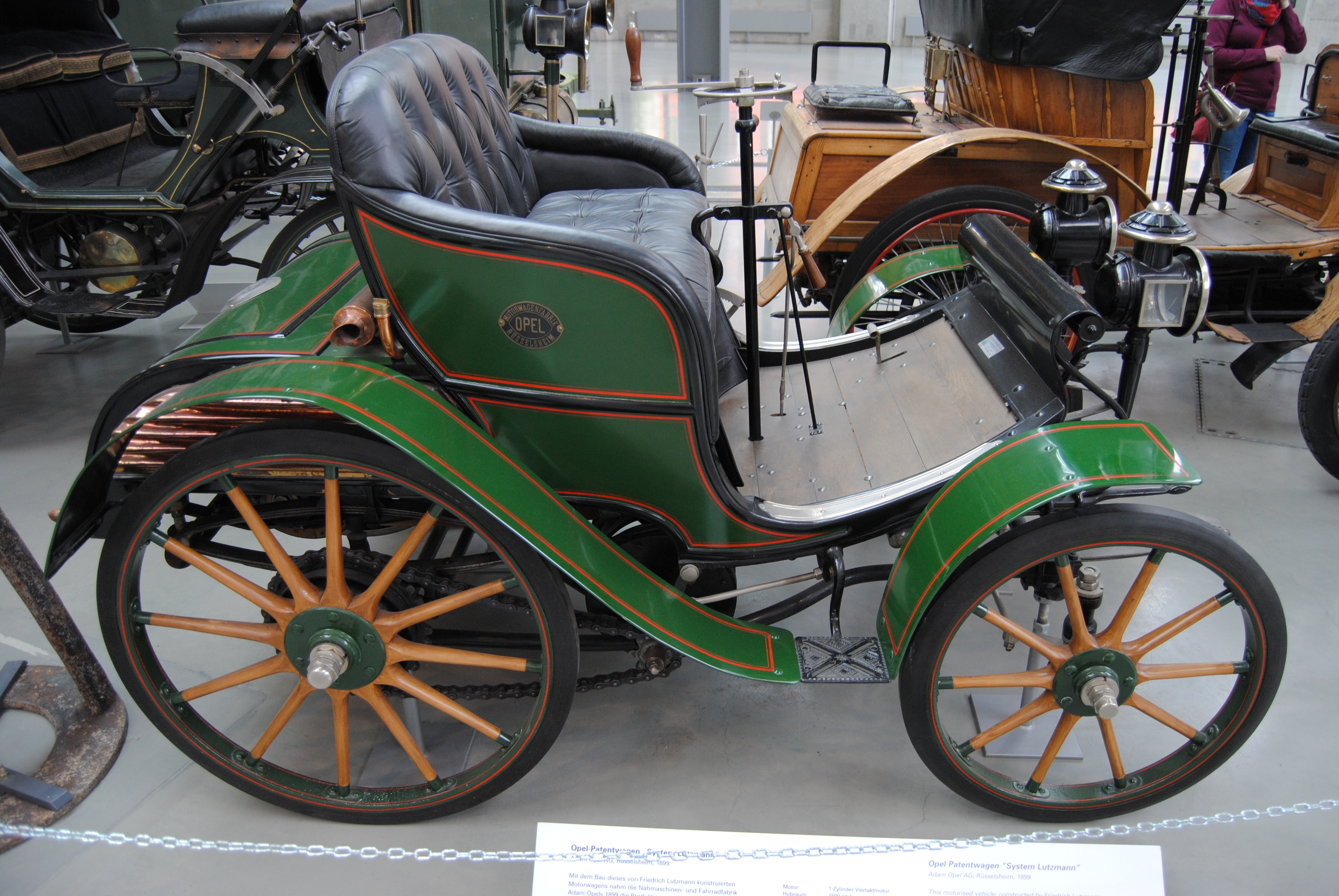 Opel Patentmotorwagen („System Lutzmann“), im Deutschen Museum in München (Inv-Nr. 68765).